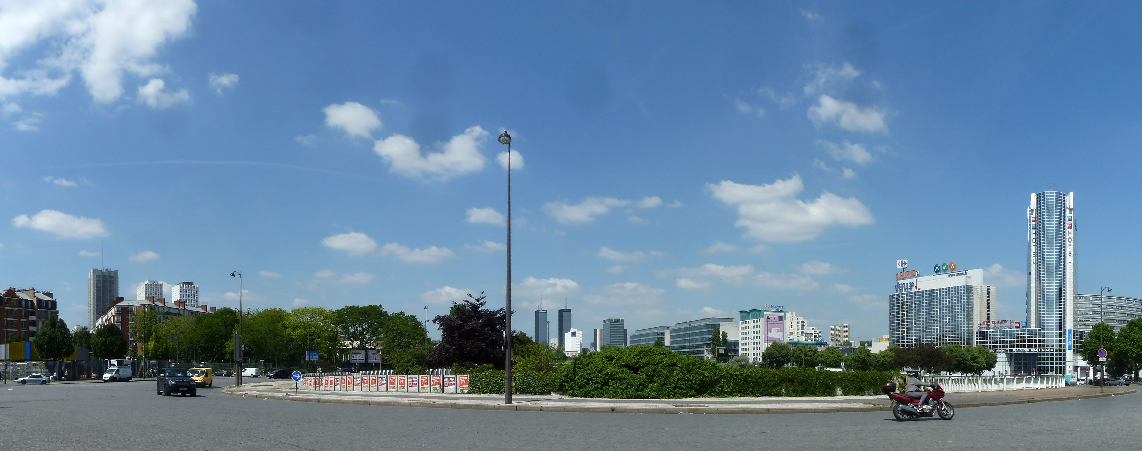 Porte de Montreuil-004